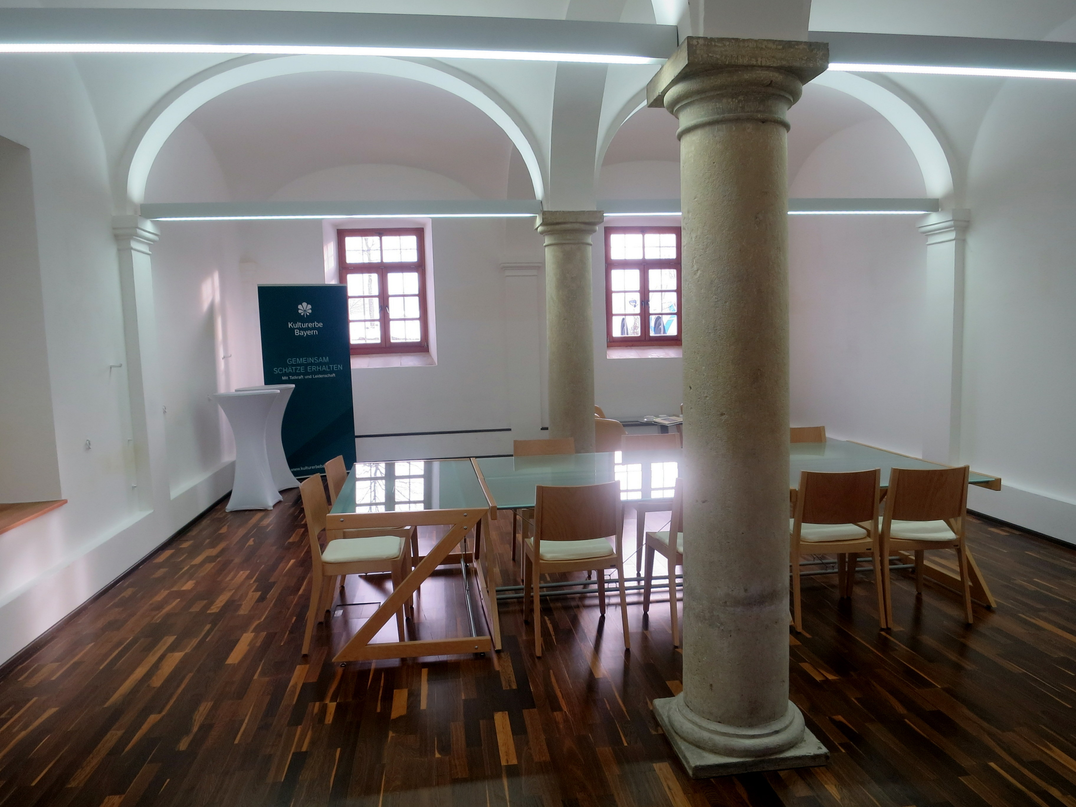 Büro und Besprechungsraum 01